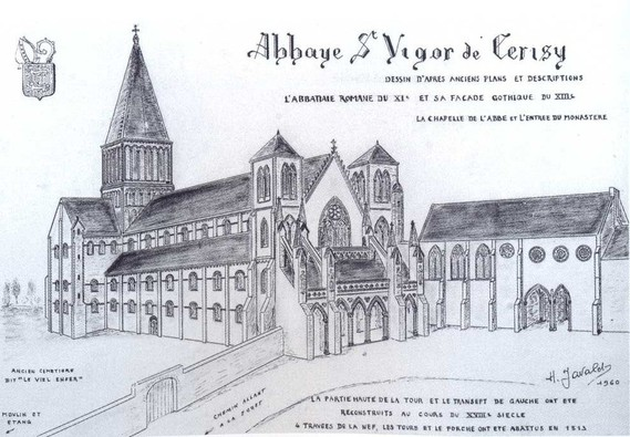 abbaye autrefois